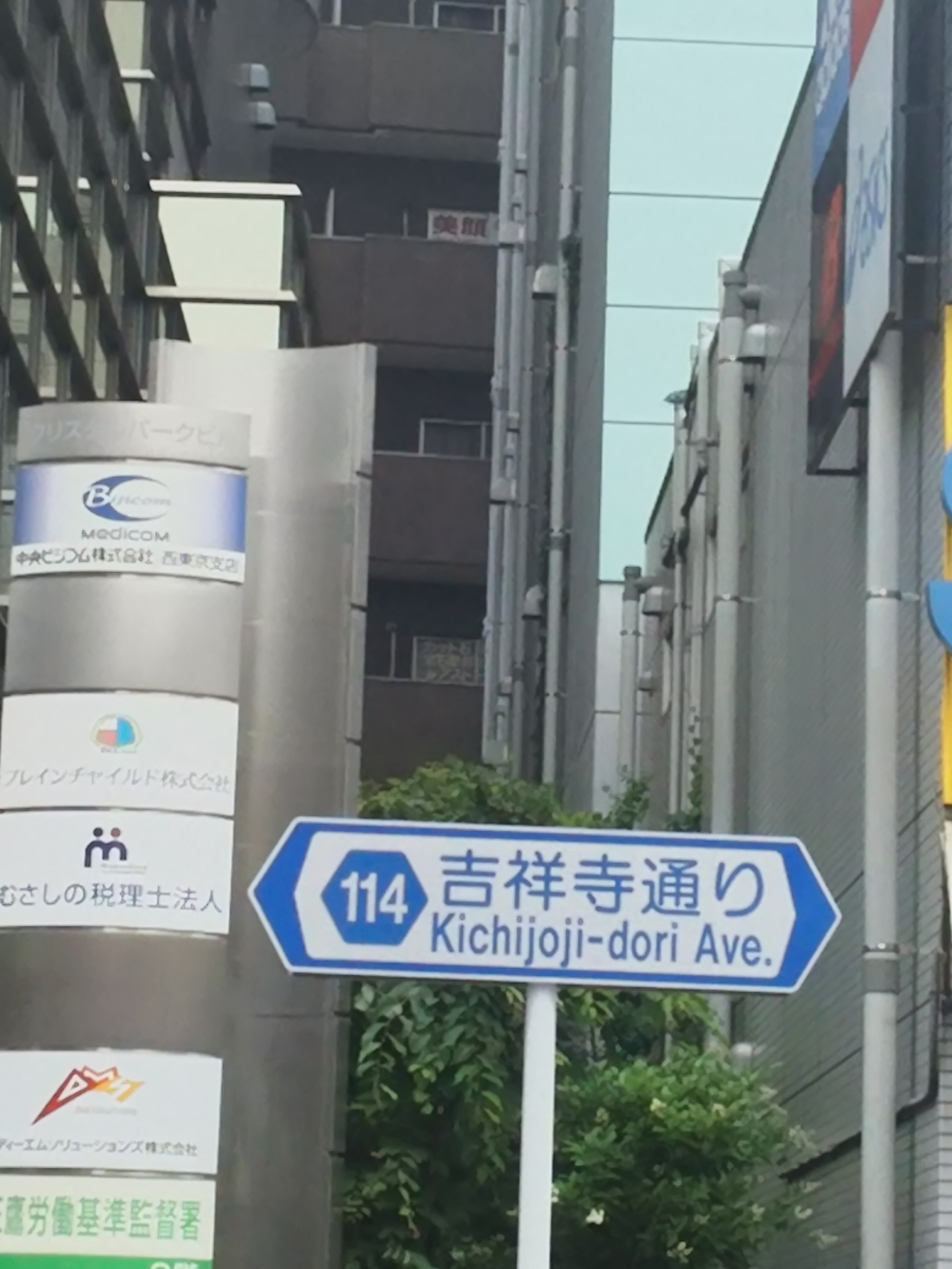 2018年5月撮影 東京都道114号 吉祥寺通り